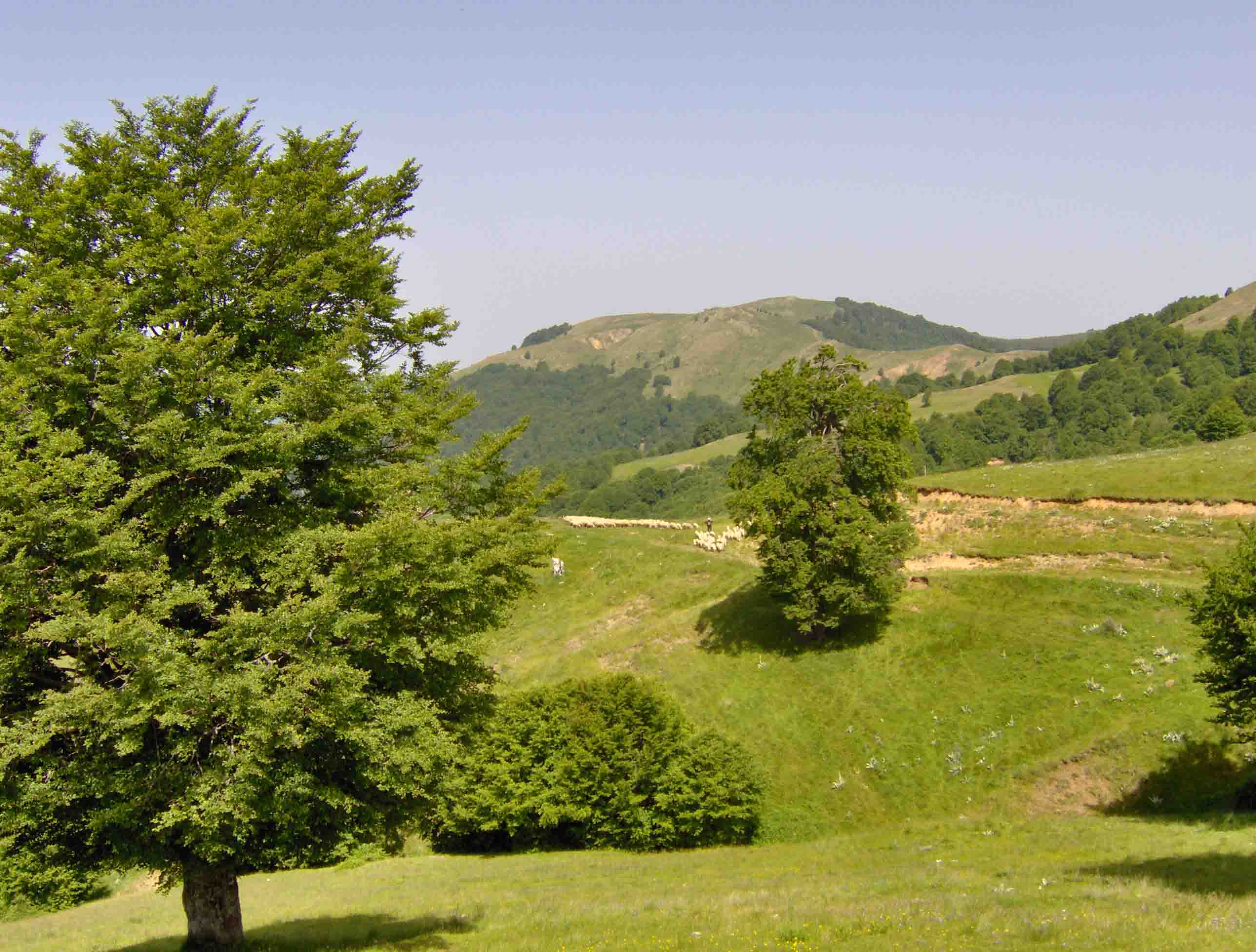 Osogovski mountains near Ponikva ski resort, R.o.Macedonia Okolice ośrodka Ponikva, góry Osogovski Planini, Macedonia Дел од Пониква, Осоговски Планини, Македонија